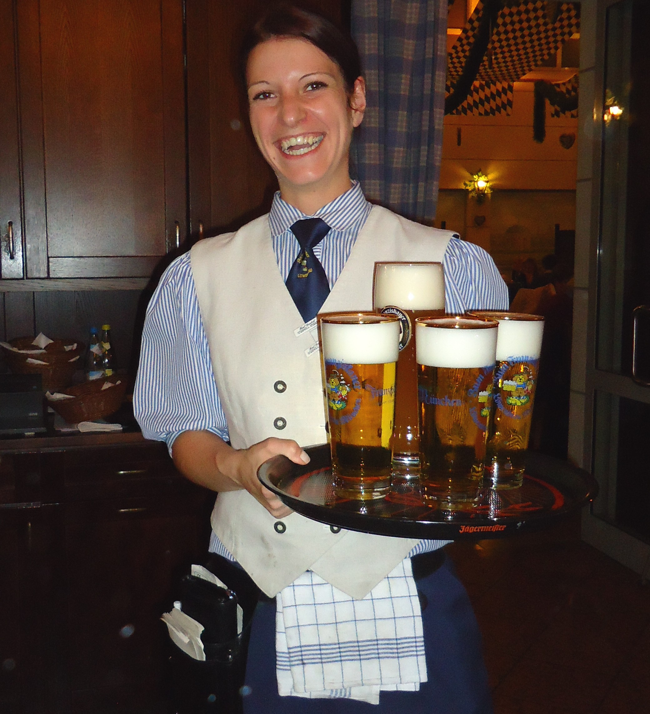 Öl serveras i "Zum Franziskaner" i München